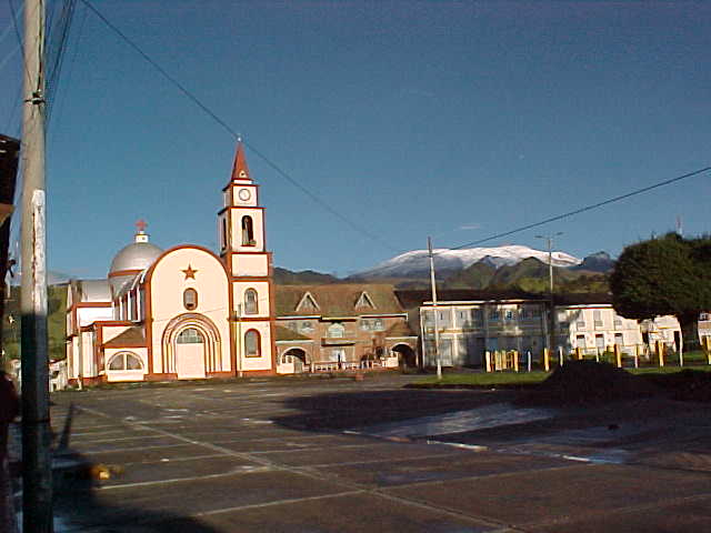 Al fondo se puede apreciar el Nevado del Ruiz